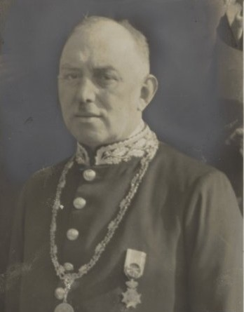 H.P.J. Bloemers, nieuwe burgemeester van Groningen.